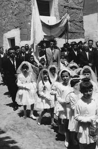 Procesión del Corpus Christi.